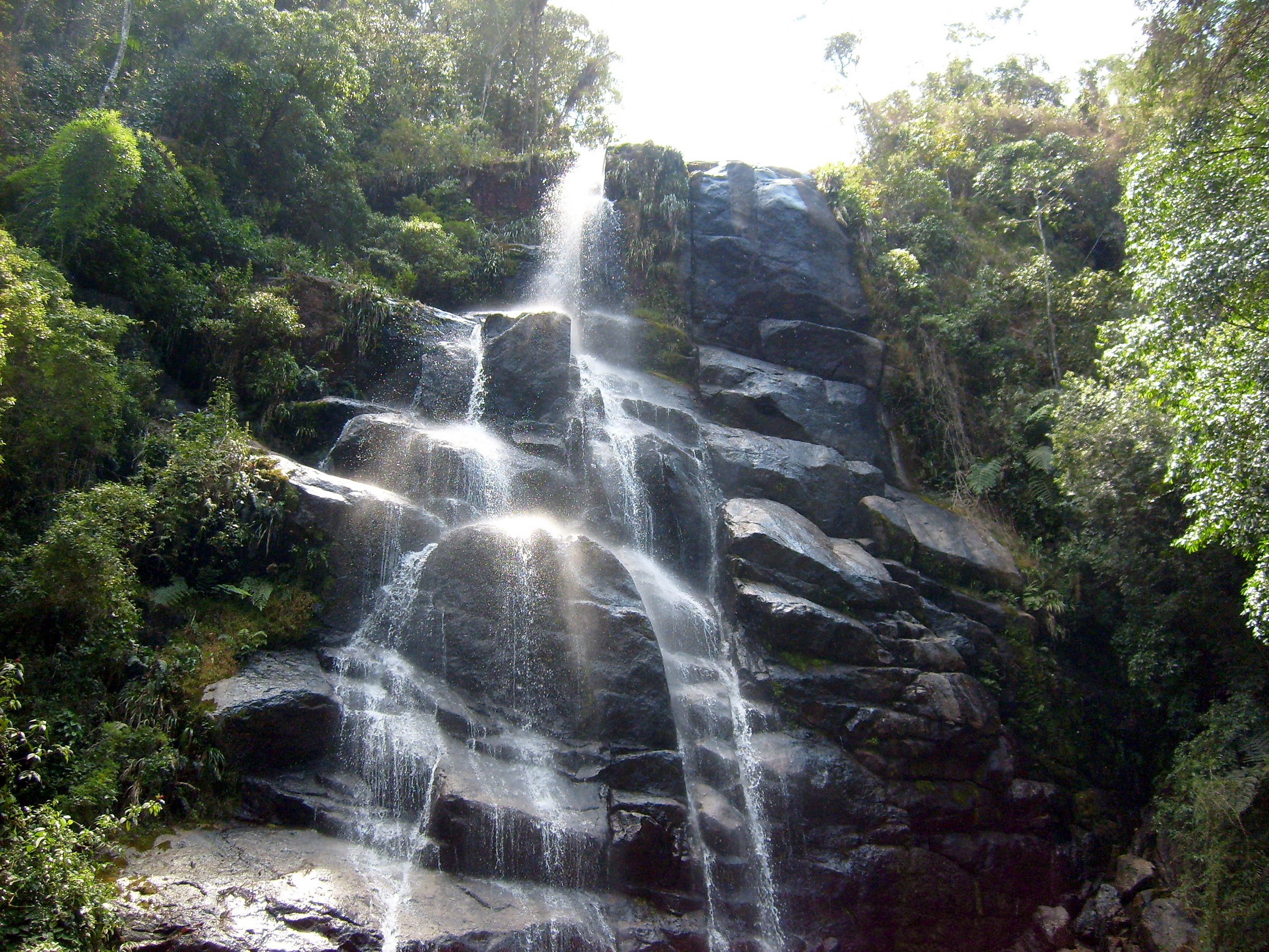 Cachoeira Véu da Noiva, Parque Nacional do Itatiaia._____Véu da Noiva waterfalls, Itatiaia National Park.